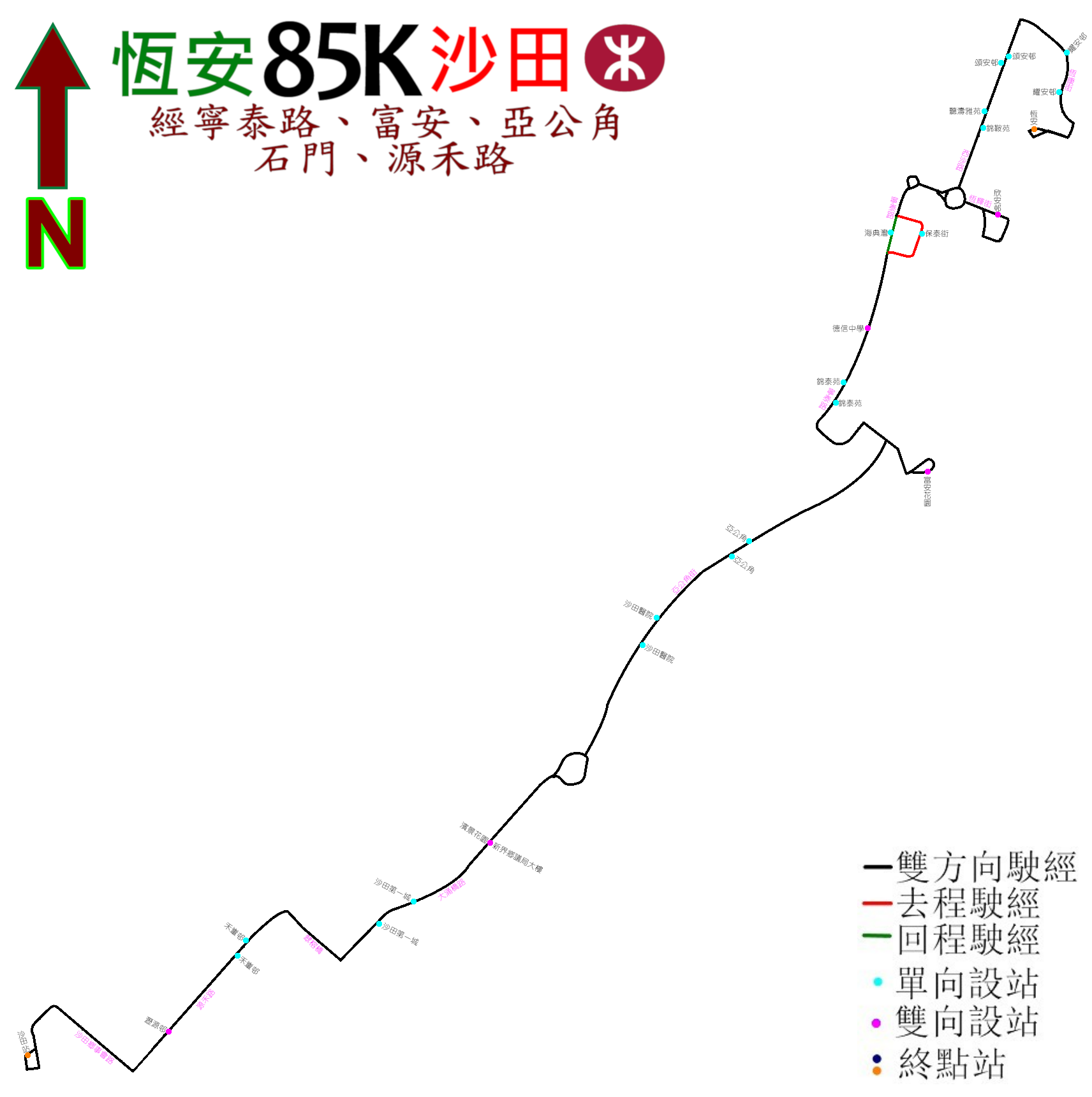 中文（香港）: 九巴85K線的走線圖